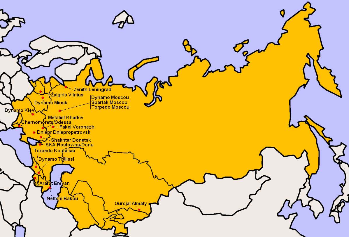 Clubs participants à la Division Supérieure 1985.